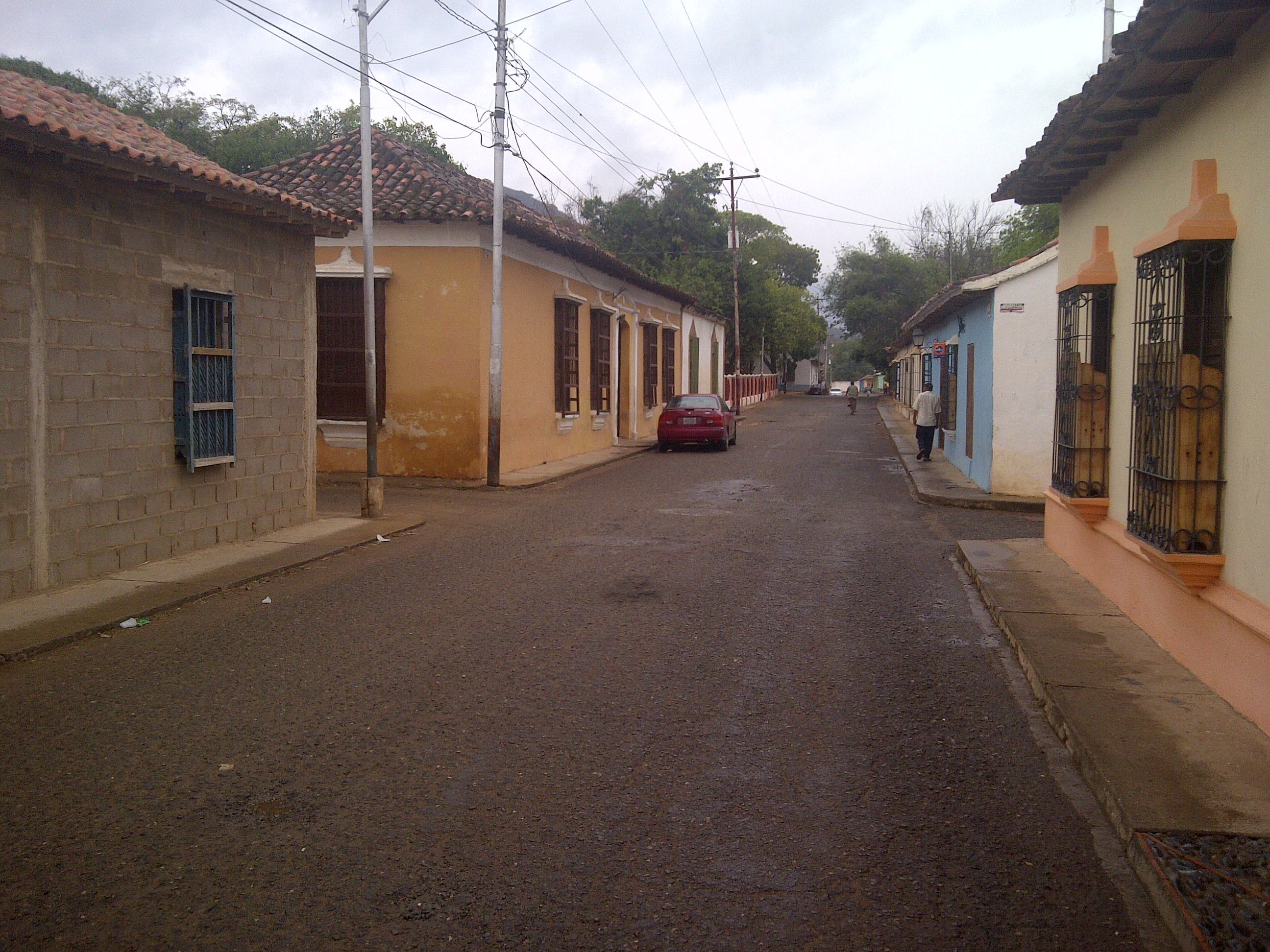 Curarigua